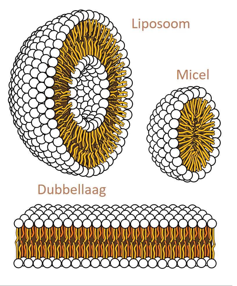 Fosfolipiden